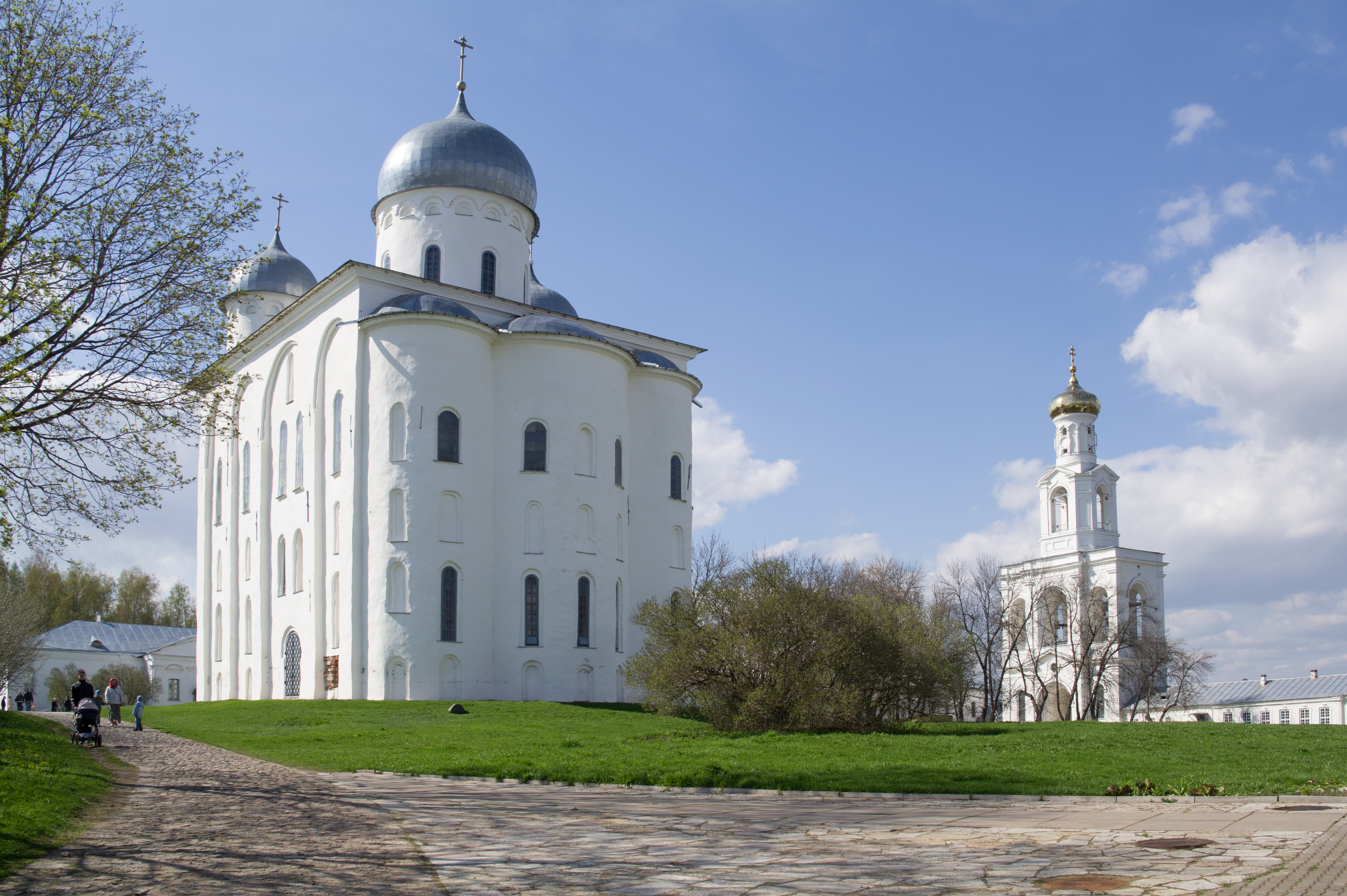 Ансамбль Юрьева Монастыря. Великий Новгород.